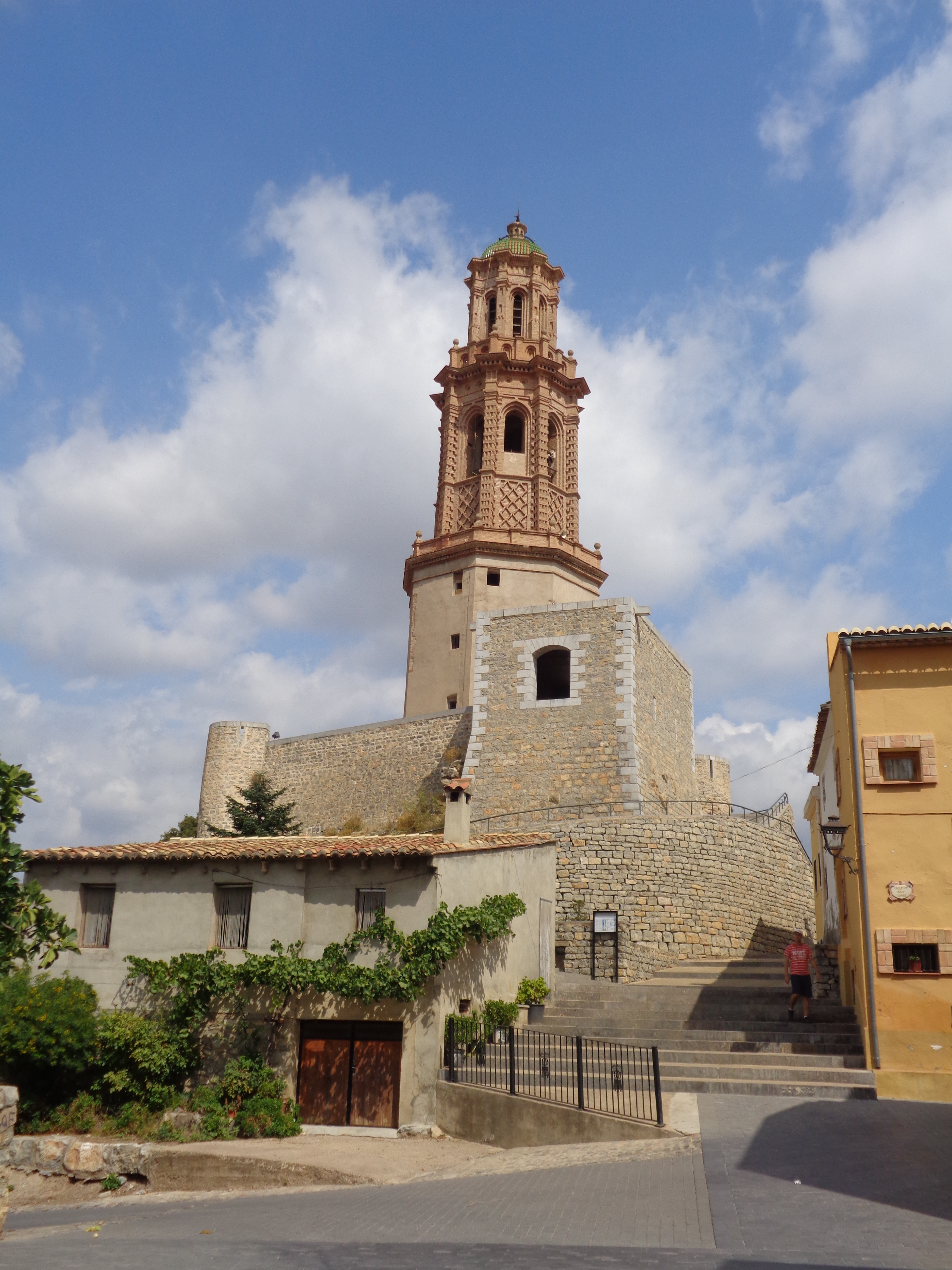 Torre mudèjar de l'Alcúdia. 07.071-005.